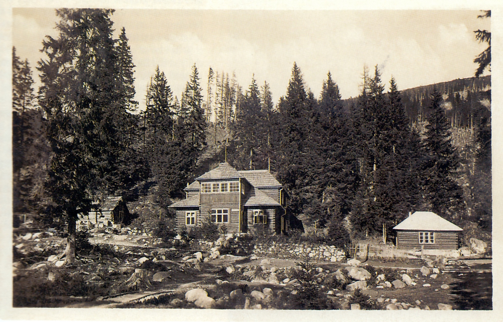 V roku 1933 stála pri Šalviovom prameni vo Vysokých Tatrách chata.